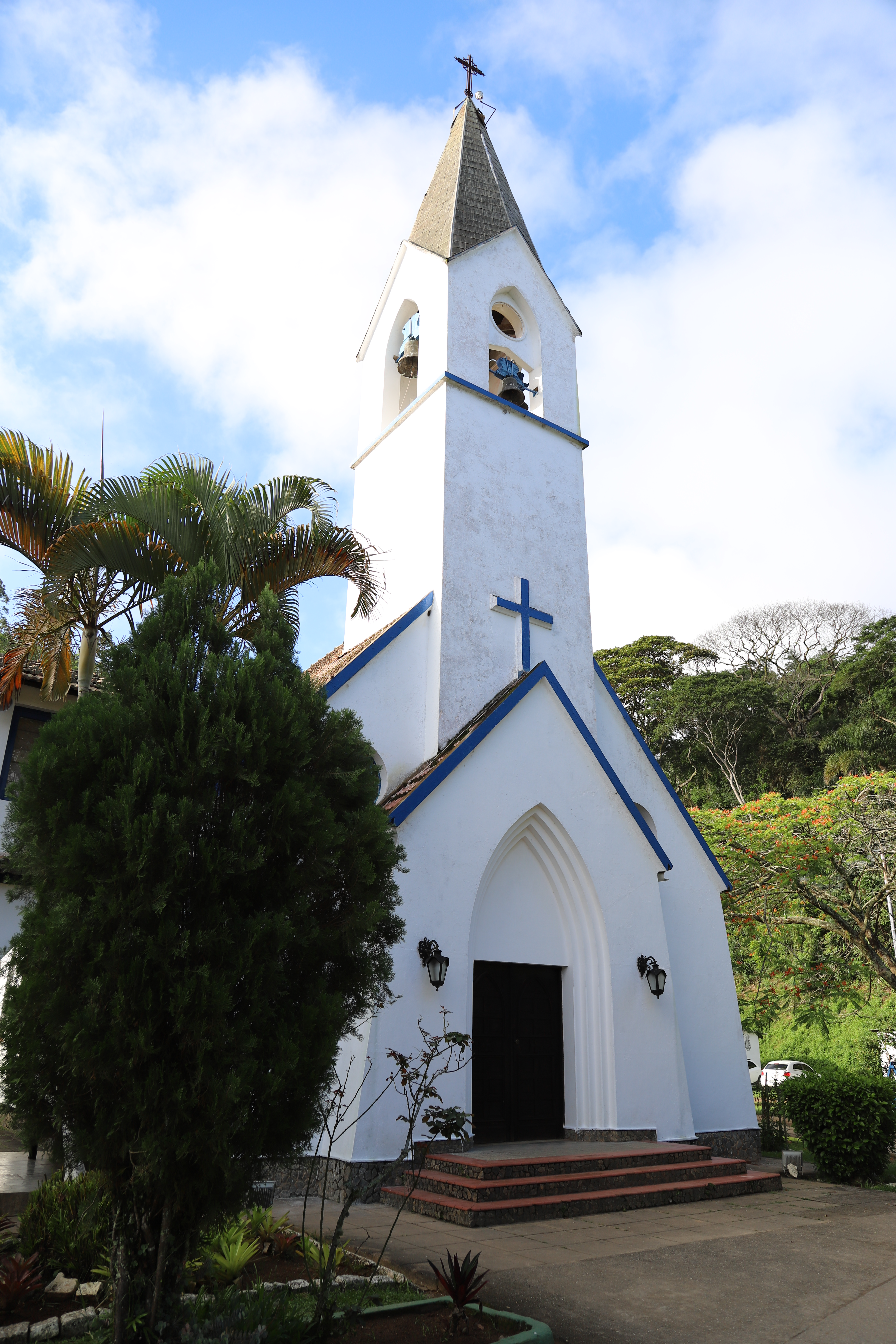 Igreja pertencente ao antigo Seminário Aloisianum ligada ao colégio Santo Inácio no Rio de Janeiro localzada dentro das dependencias do Hotel Santa Bárbara em Engenheiro Paulo de Frontin - RJ.